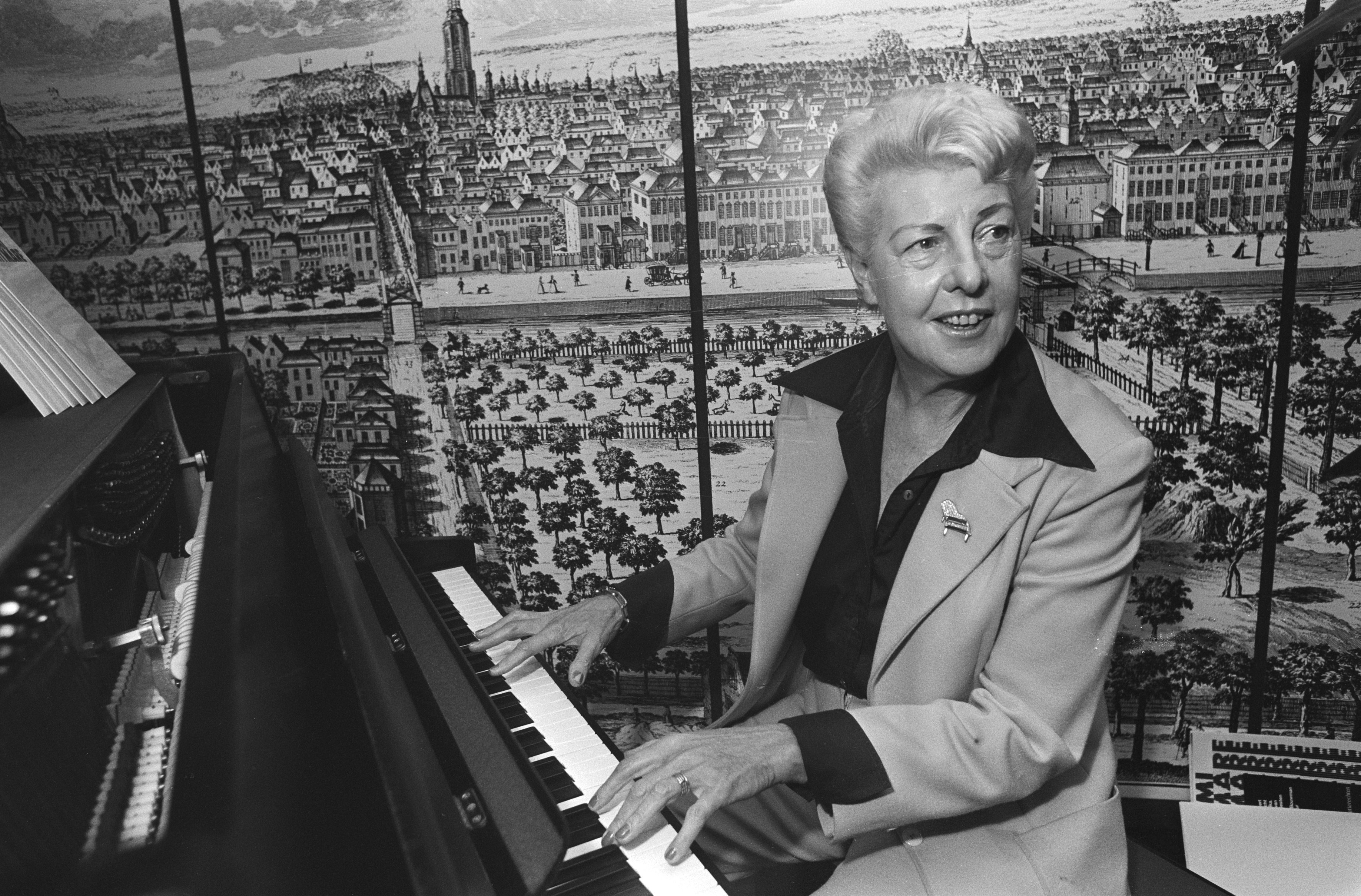 Collectie / Archief : Fotocollectie Anefo Reportage / Serie : [ onbekend ] Beschrijving : In Den Haag de plaatopname presentatie van Miami Nightmare, een 3 jaar eerder gegeven benefietconcert tijdens anti Anita Bryantmanifestatie Annotatie : Pia Beck achter de vleugel Datum : 27 november 1980 Locatie : Den Haag, Zuid-Holland Trefwoorden : grammofoonplaten, jazz Persoonsnaam : Beck, Pia Fotograaf : Croes, Rob C. / Anefo Auteursrechthebbende : Nationaal Archief Materiaalsoort : Negatief (zwart/wit) Nummer archiefinventaris : bekijk toegang 2.24.01.05 Bestanddeelnummer : 931-1744